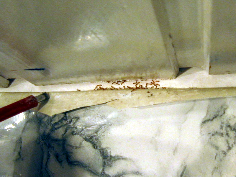 Pharaoameisen in einem Wohnhaus